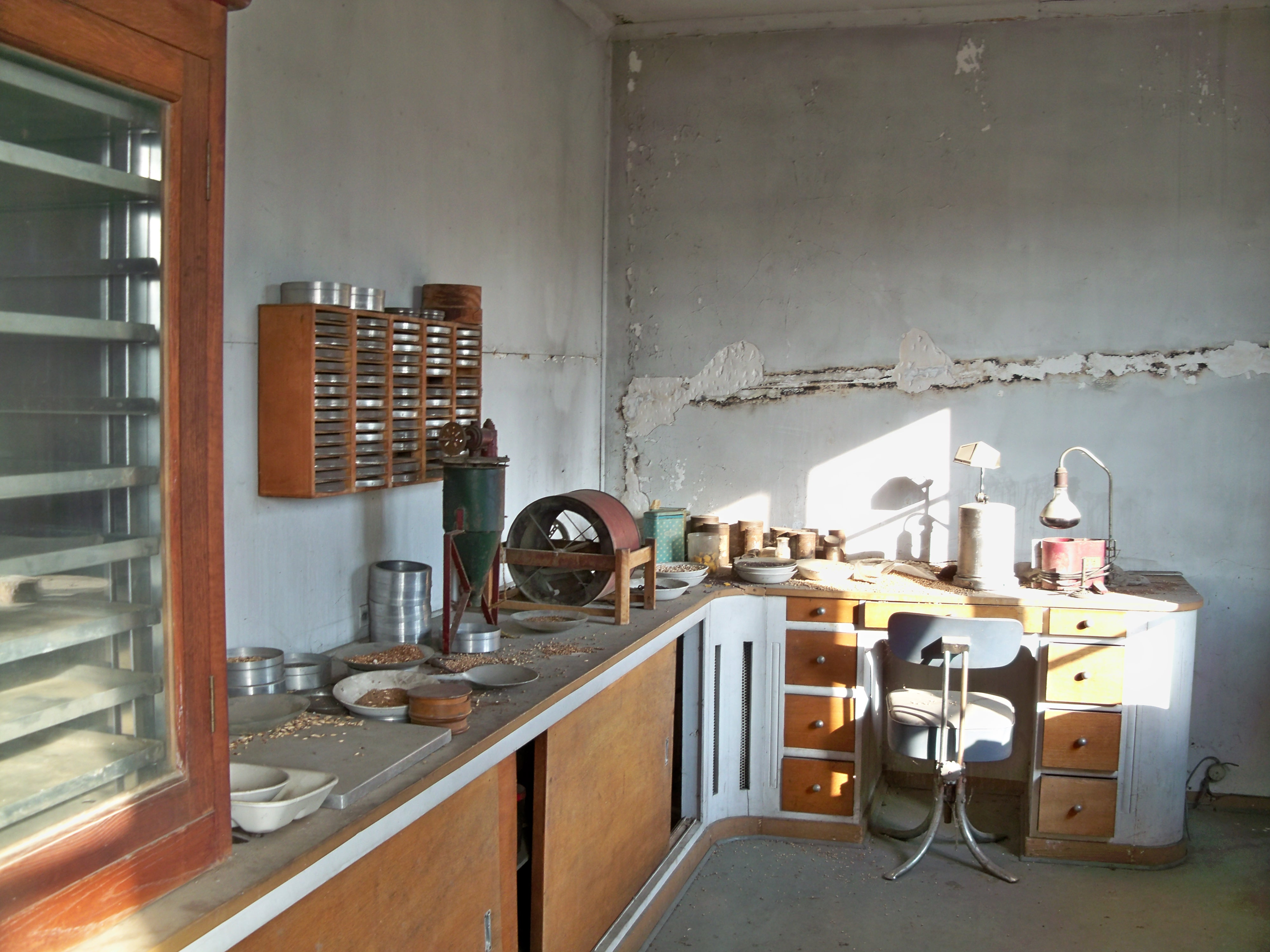 Intérieur de la Graineterie Aimé Roux, Carpentras (84) .